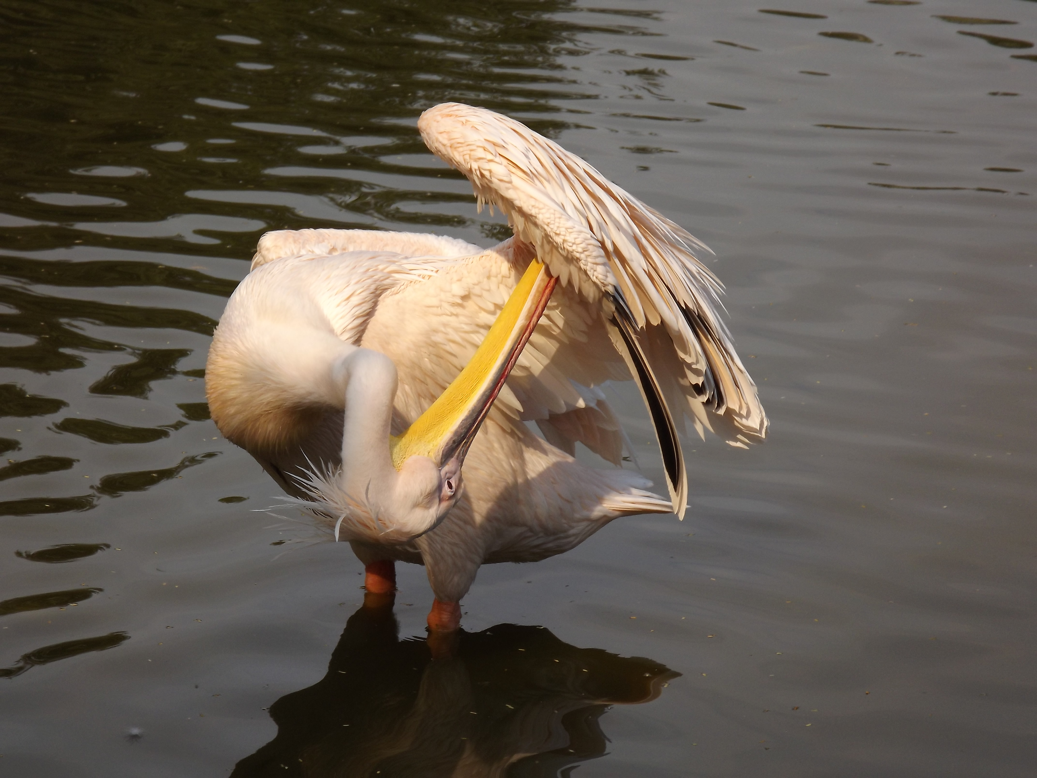 حديقة حيوان النزهة - الاسكندرية